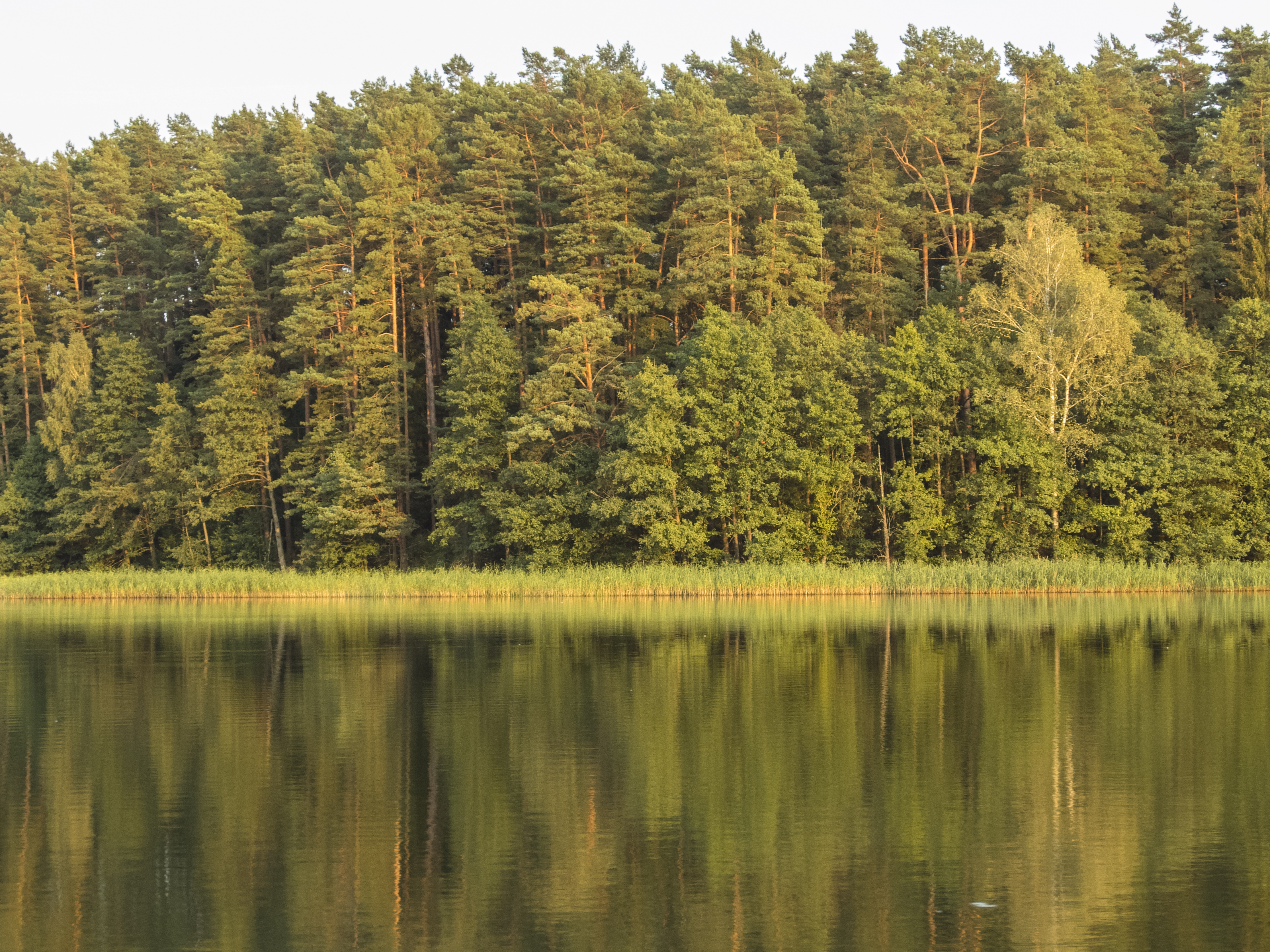 Jezioro Ganckie, brzeg wschodni